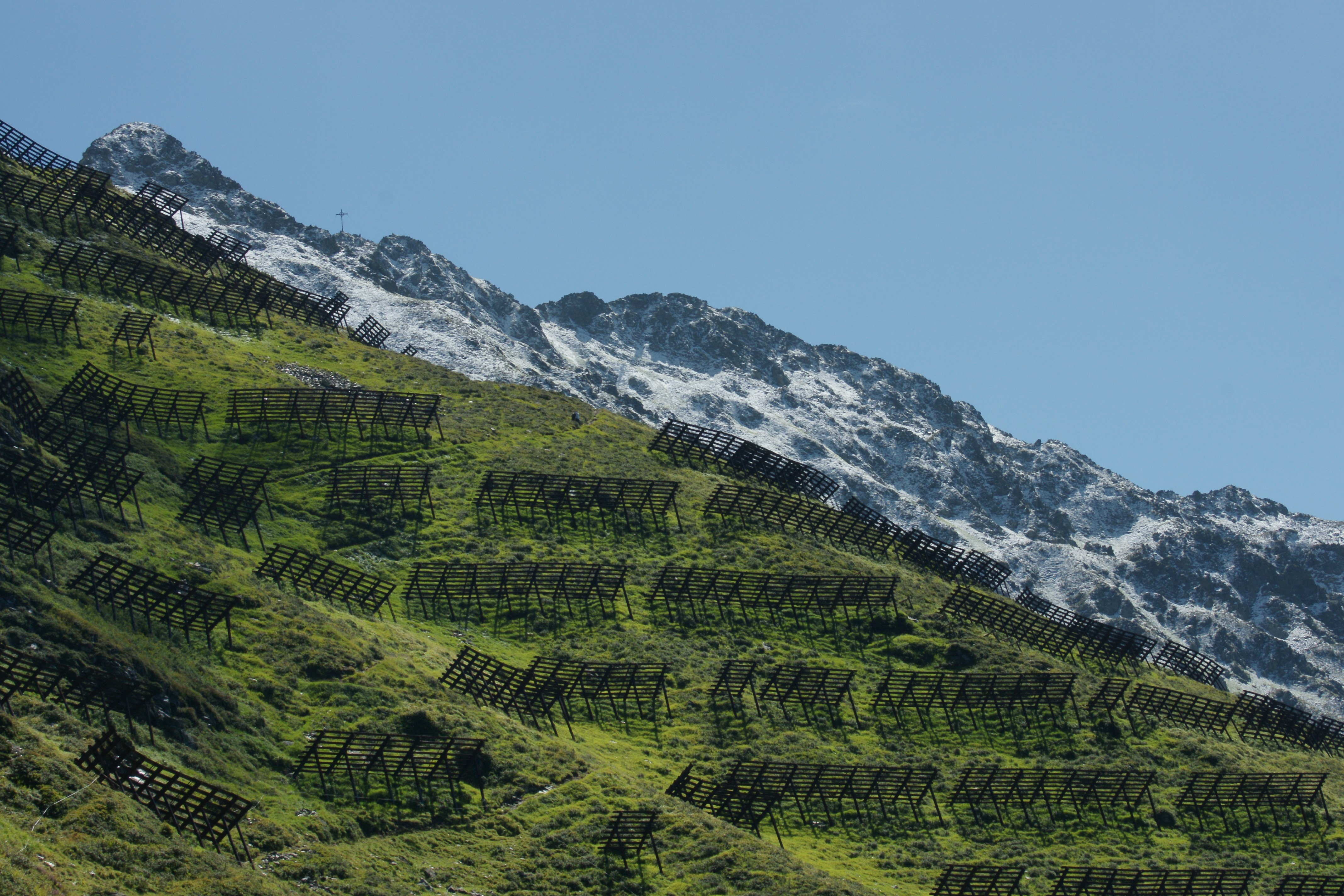 Blick von der Sennigratbahn zum Sennigrataufstieg, der durch Lawinenfangzäune führt. Neuschnee auf dem 2396m hohen Kreuzjoch Schruns.